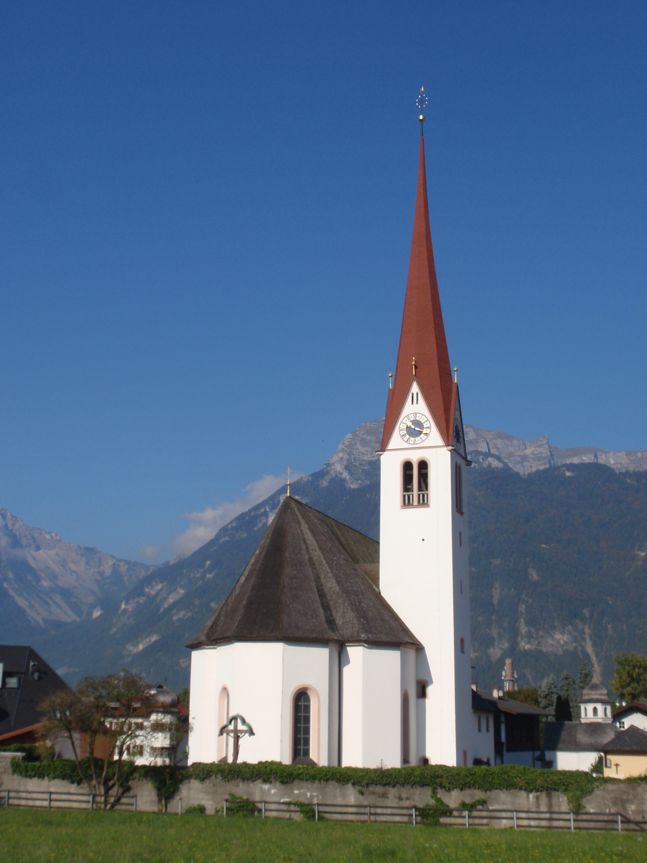 Kath. Pfarrkirche Unsere Liebe Frau Vermählung